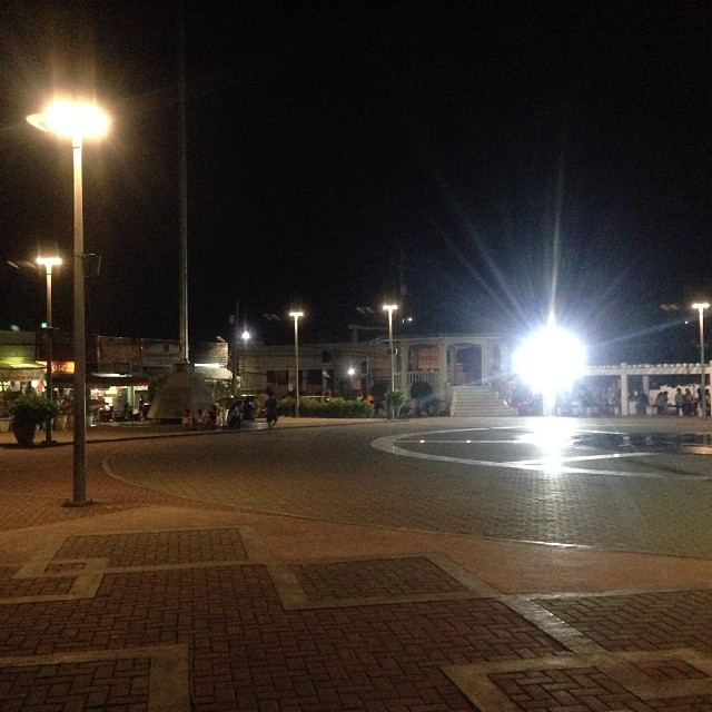 Guingona Park, Butuan City, Philippines